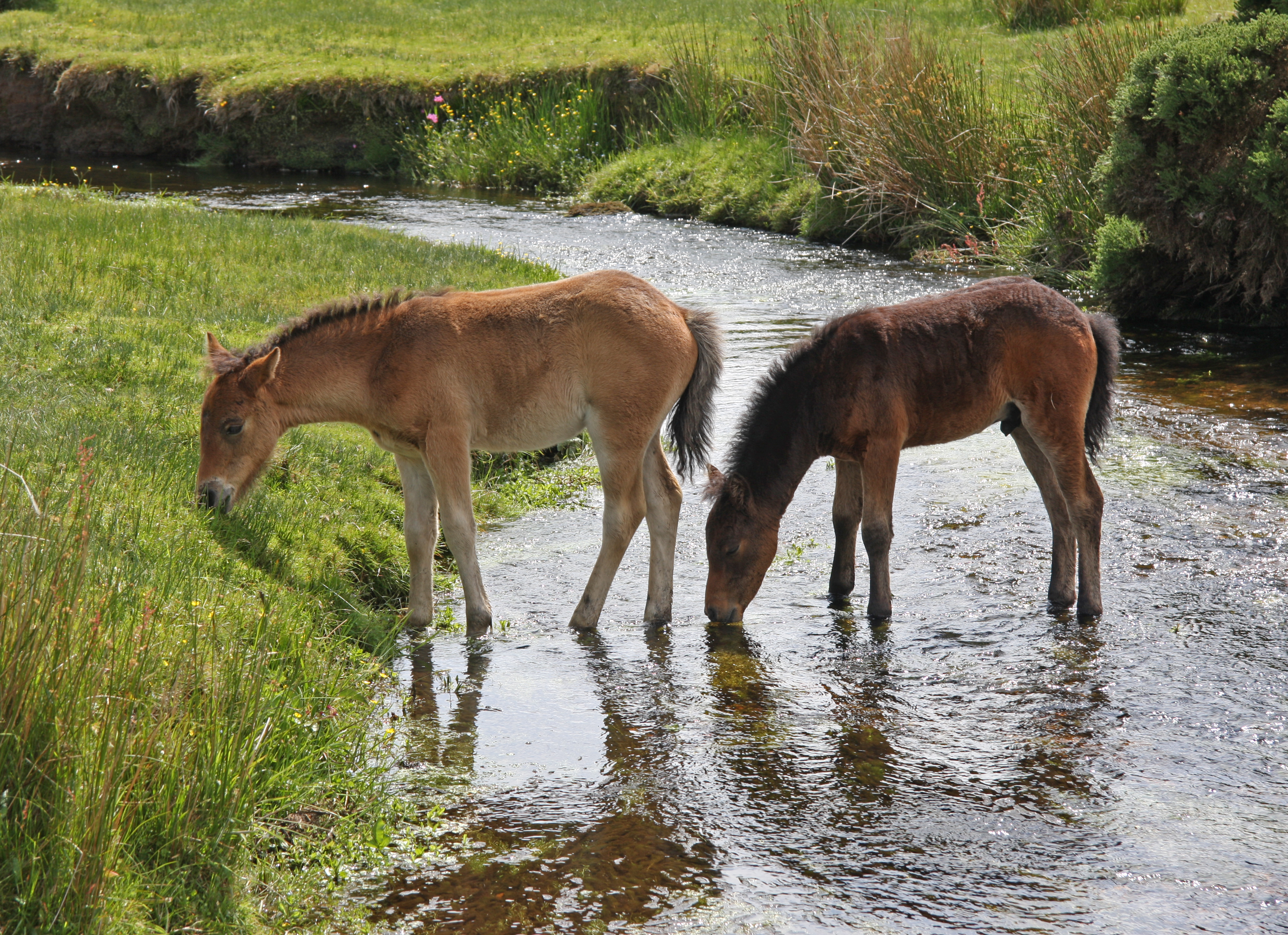 Dartmoor ponies grazing and drinking